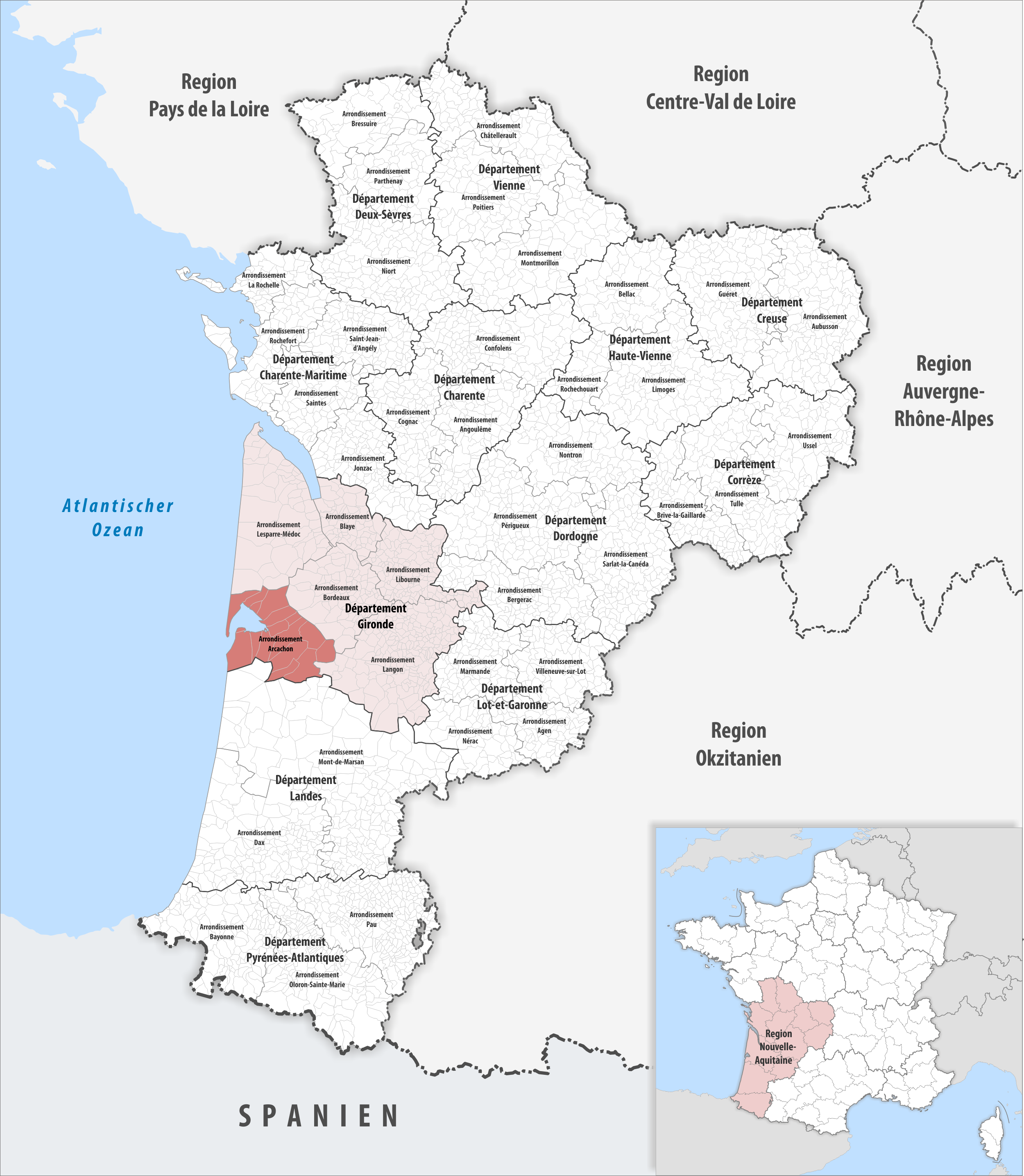 Lage des Arrondissements Arcachon